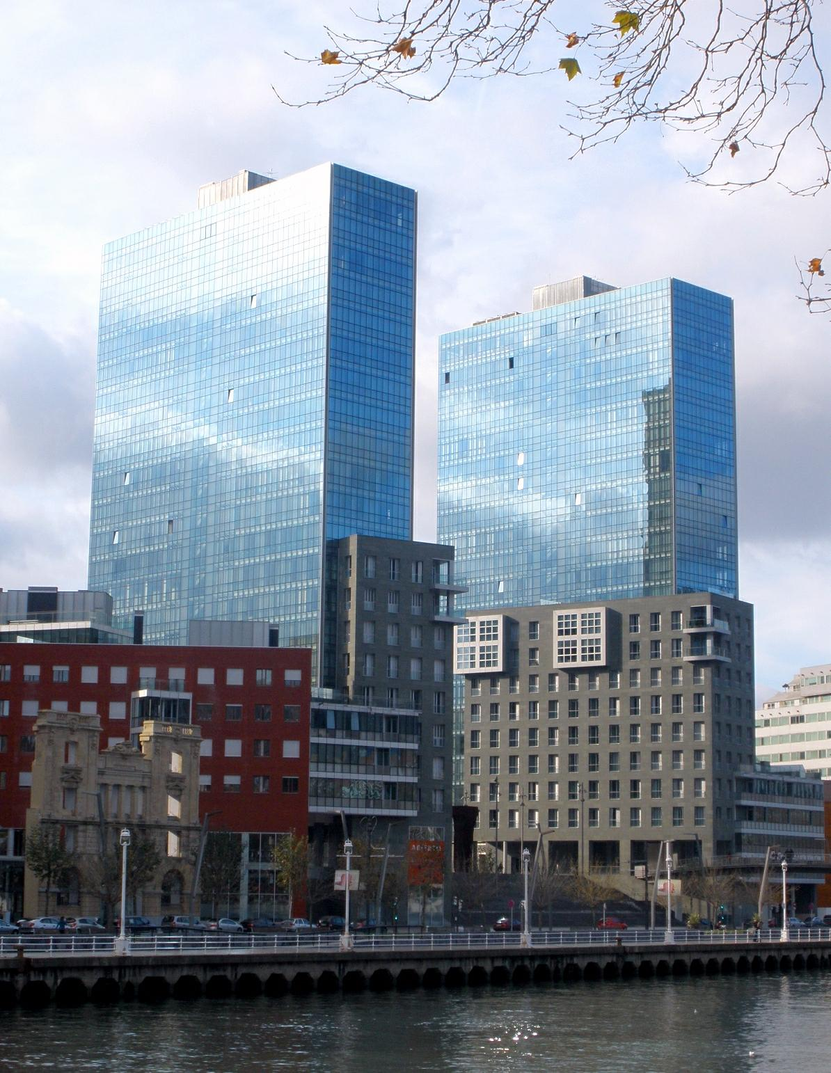 Izosaki Dorreak, Bilbo, Euskal Herria